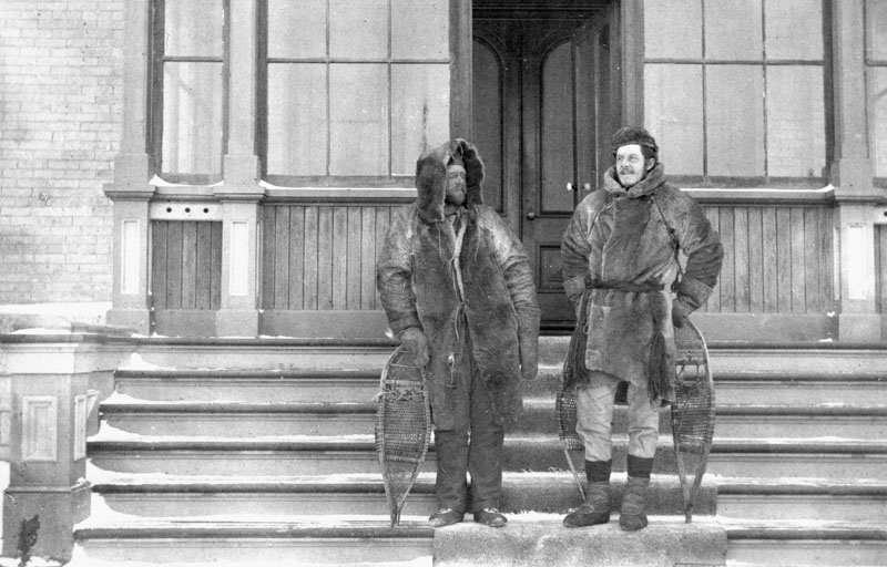 Joseph Burr Tyrrell et Monroe Fergusson - Depart de l'expédition d'exploration des Territoires du Nord-Ouest (Canada) en 1894. Source: Geological Survey of Canada / Library and Archives Canada / PA-051520 Copyright expiré - Domaine public